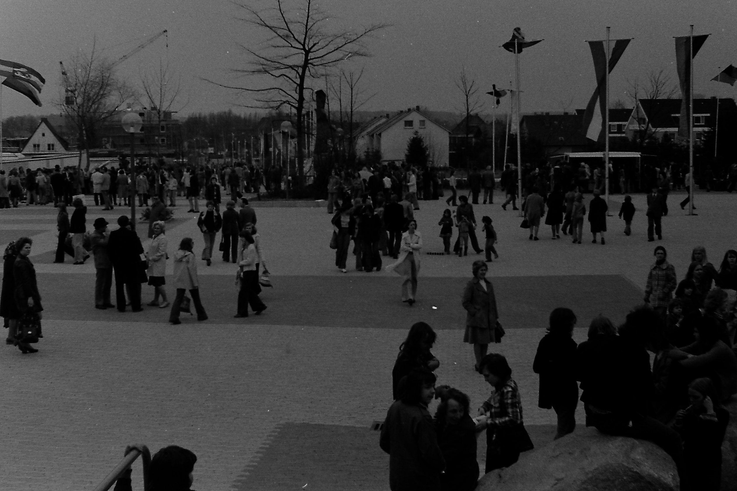 Deutschland (D) - Nordrhein-Westfalen (NW) - Kreis Lippe (LIP) - Bad Salzuflen: Einweihungsfeier des Schulzentrums Lohfeld